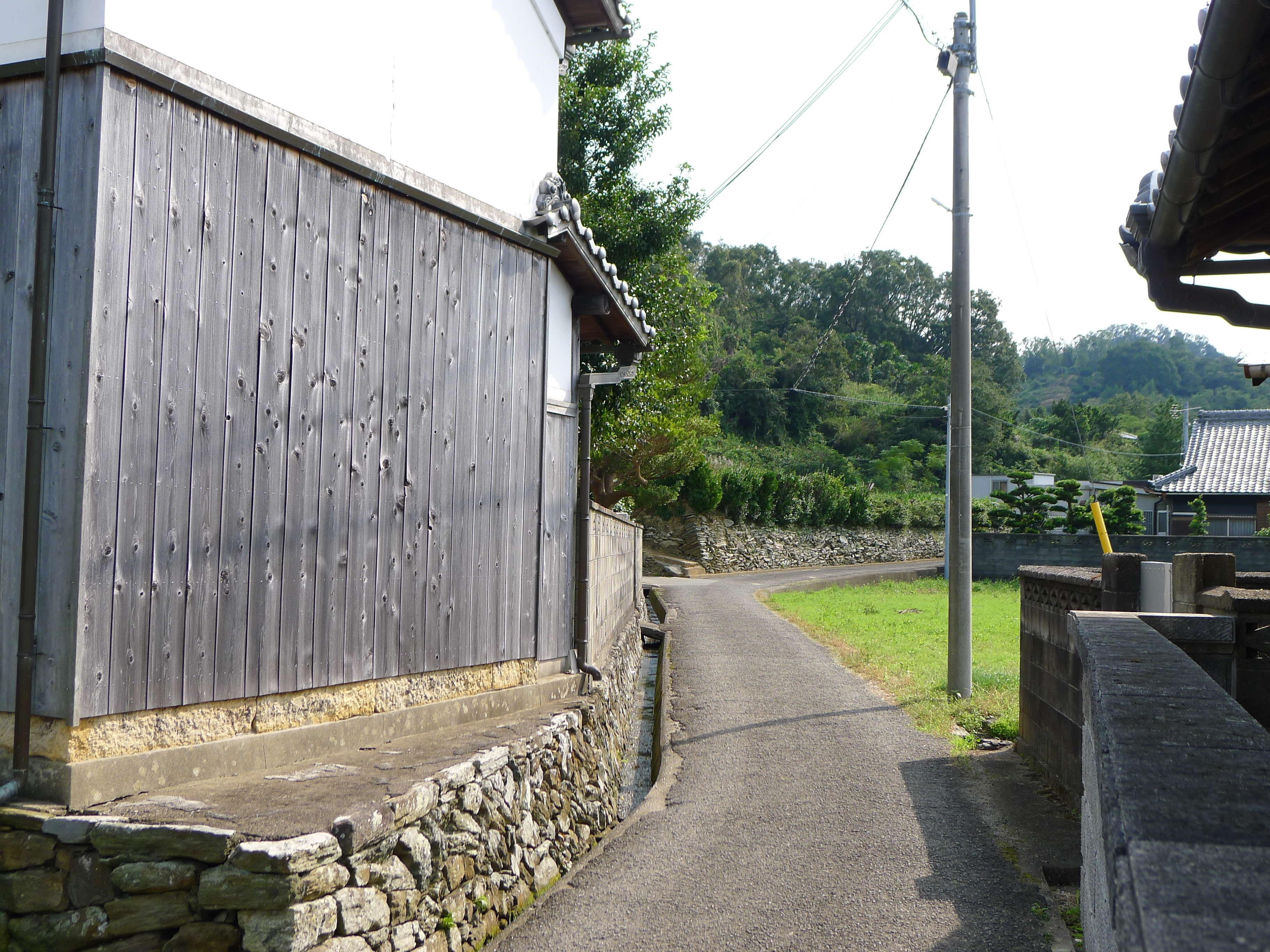 熊野古道紀伊路が通る井ノ口集落（和歌山県和歌山市）